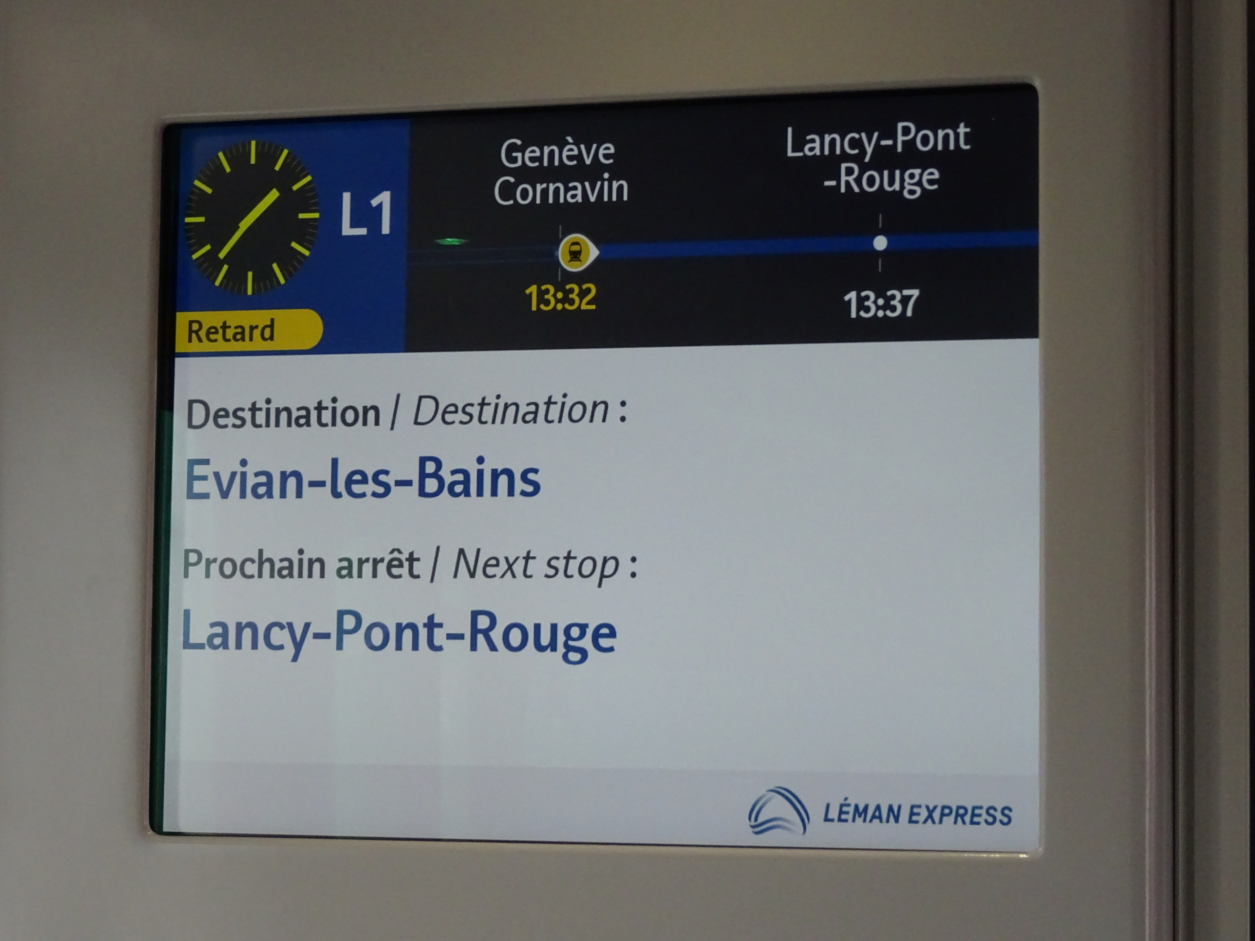 Écran d'information des horaires dans un Z 31500 annonçant un retard sur la ligne SL 1.